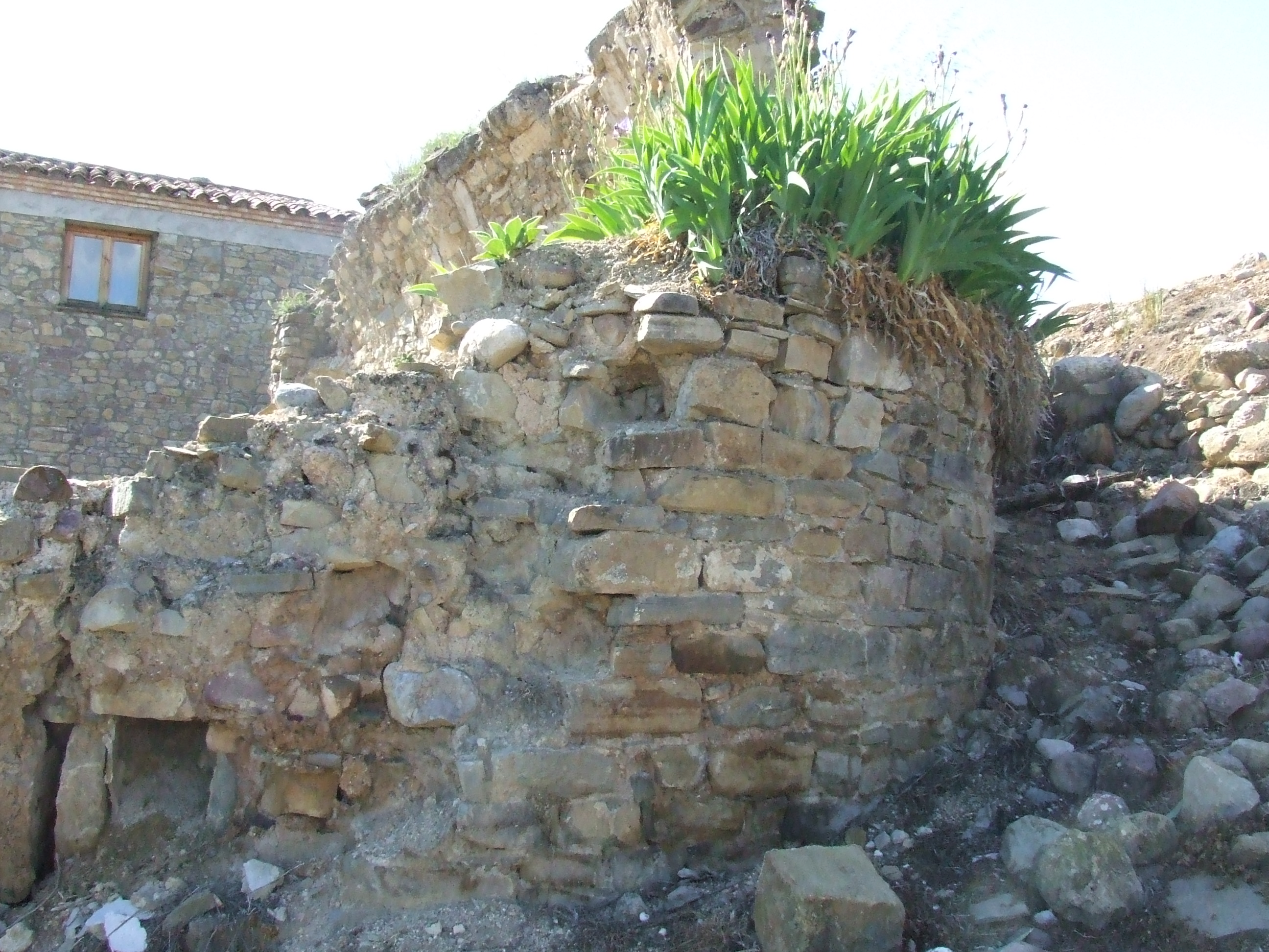 L'absis de Sant Martí de Torallola, per fora (Toralla i Serradell, Conca de Dalt, Pallars Jussà)